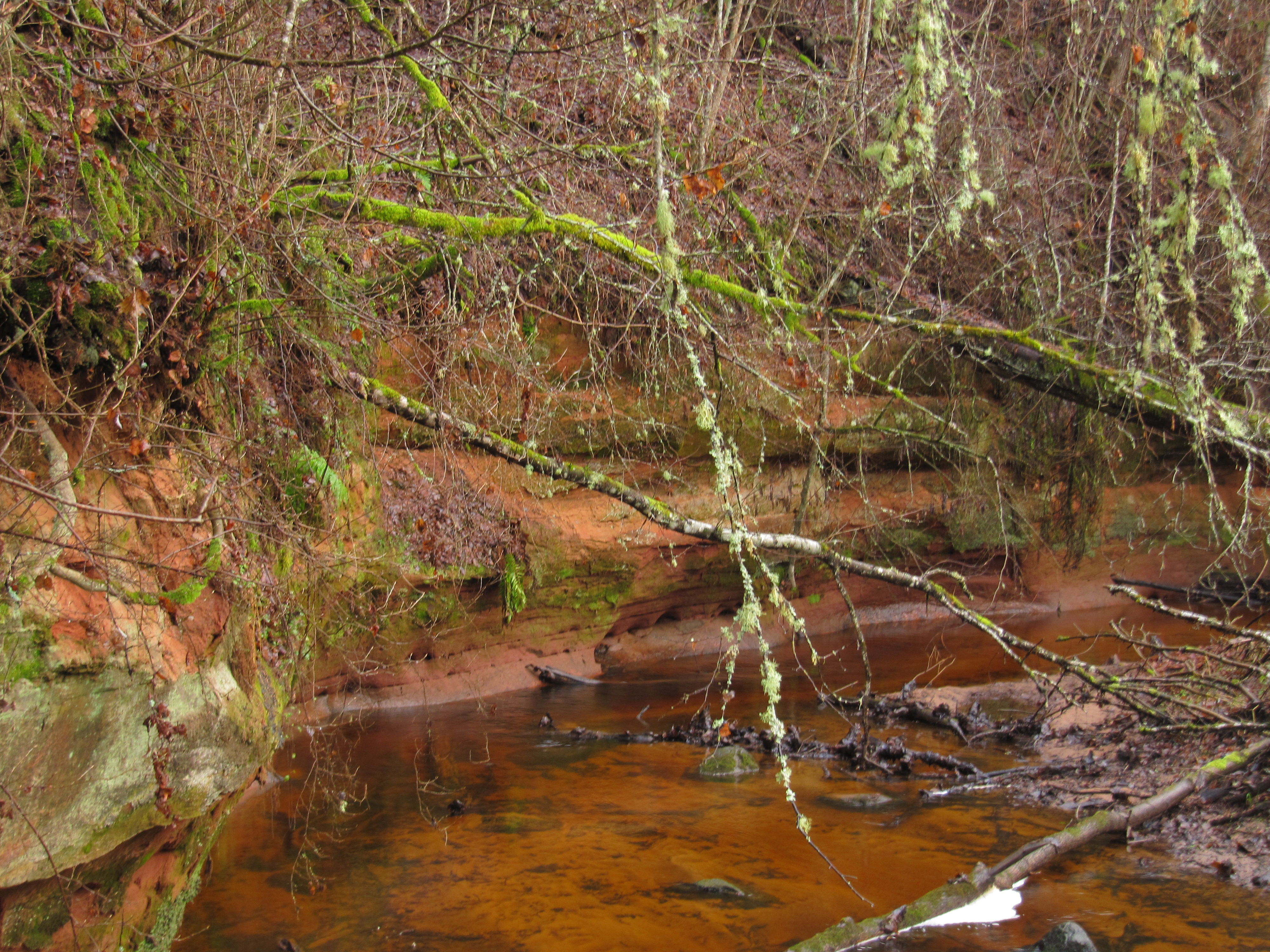 Lüütre paljand Lüütre oja vasakul kaldal, Pikamatsi veskist allavoolu.